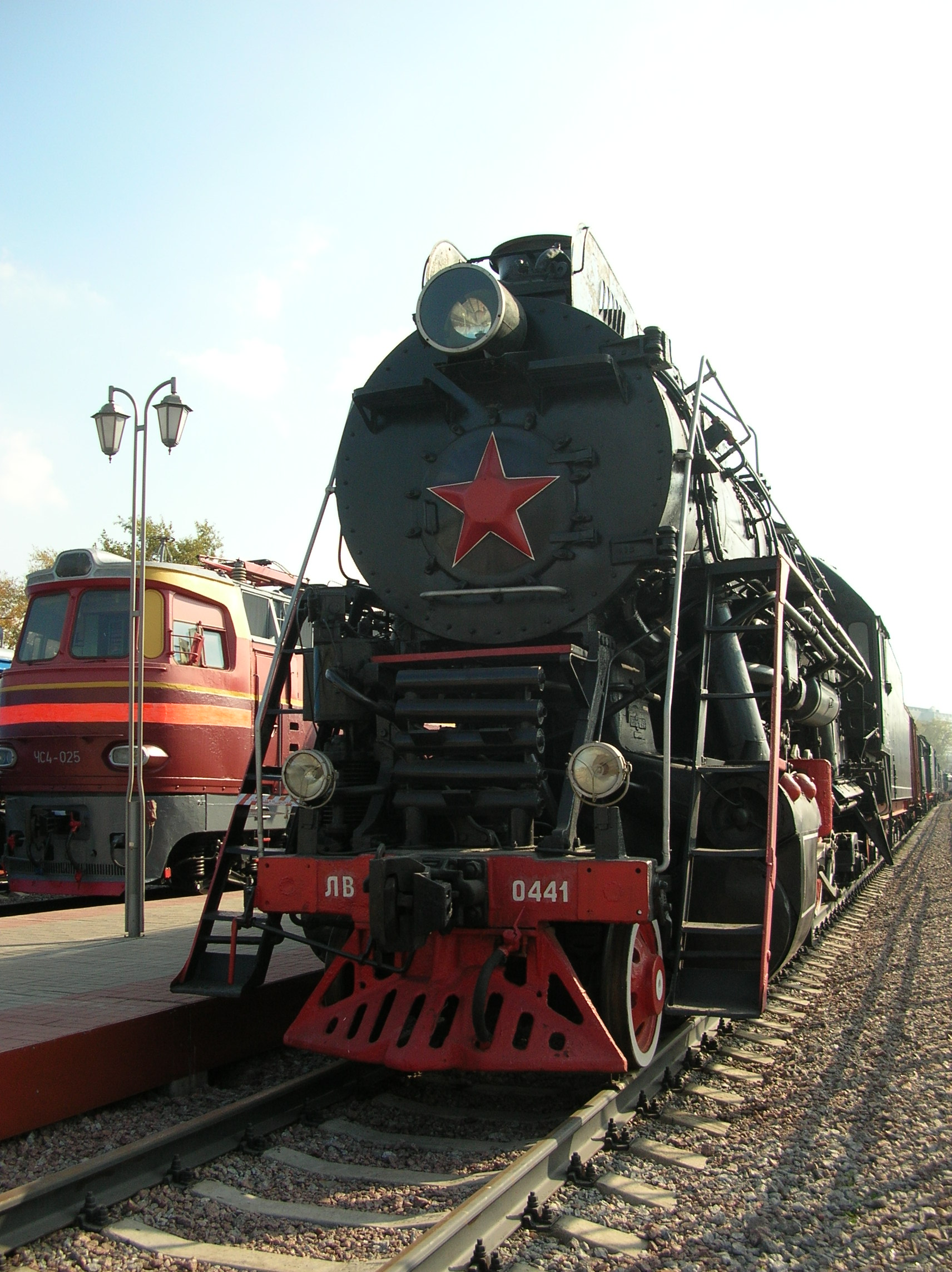 Russian steam locomotive ЛВ-0441. Moscow railroad museum